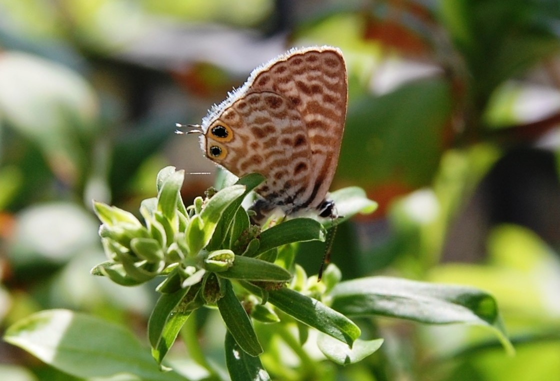 Leptotes pirithous (Lycaenidae) su Plumbago sp.